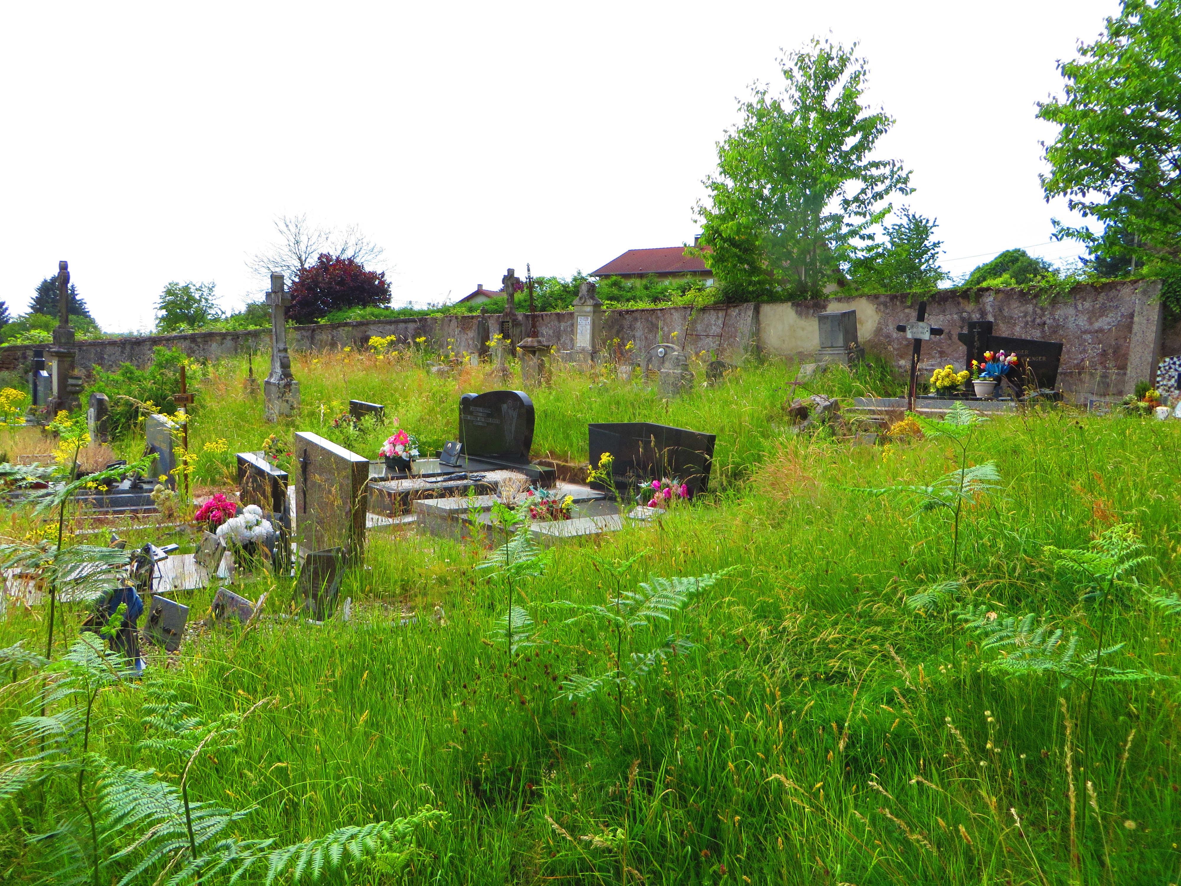 Lafrimbolle cimetiere protestant